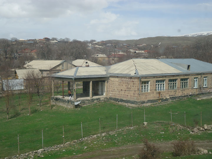 Գեղաշեն դպրոցի երաժշտական դպրոցը